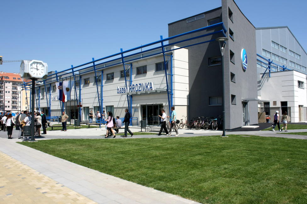 Базен Прозивка у Суботици, Србија.